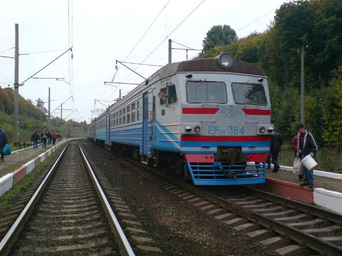 Зупинний пункт Верхня Ділянка